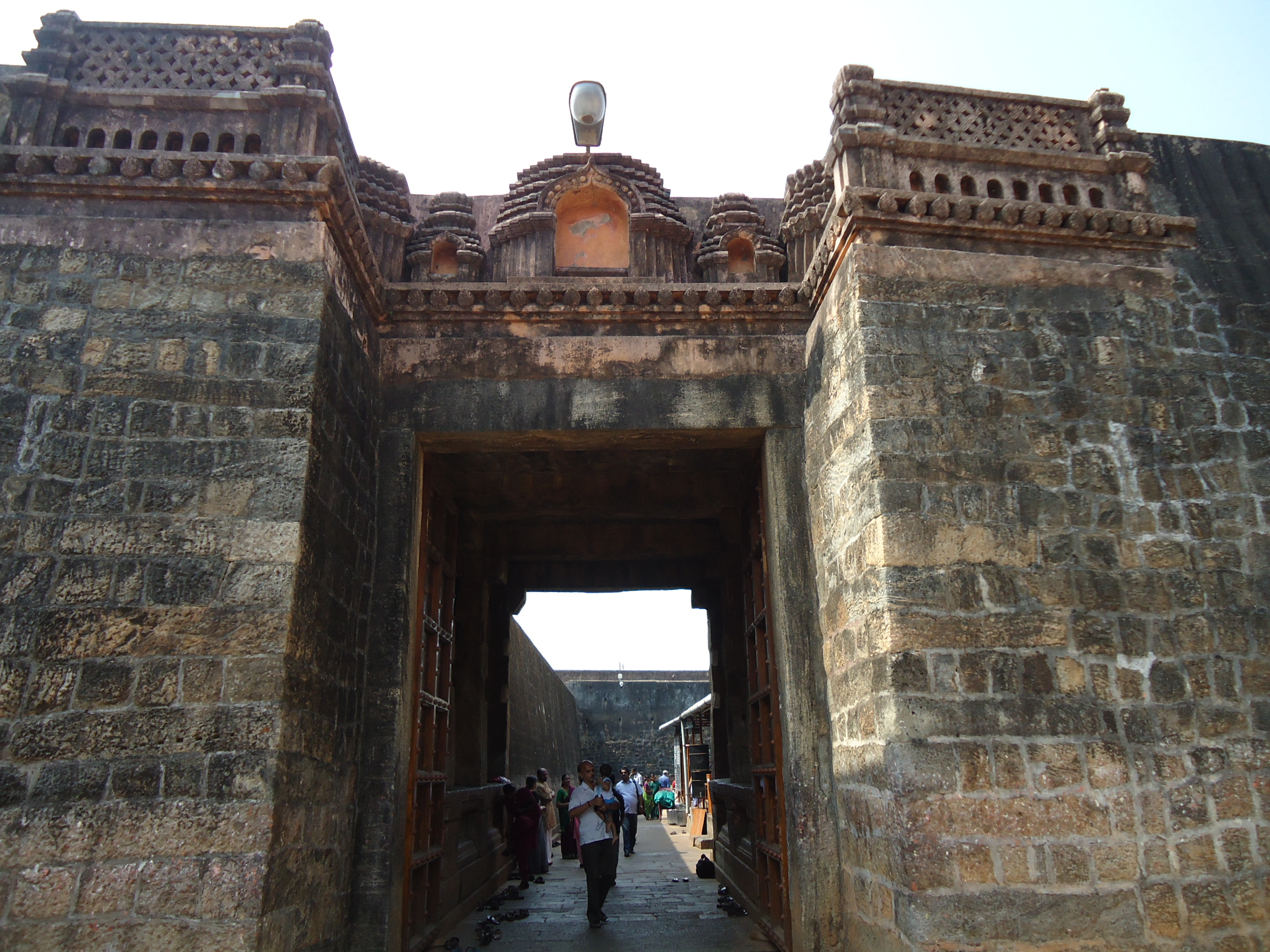 Palakkad Fort DSC09841